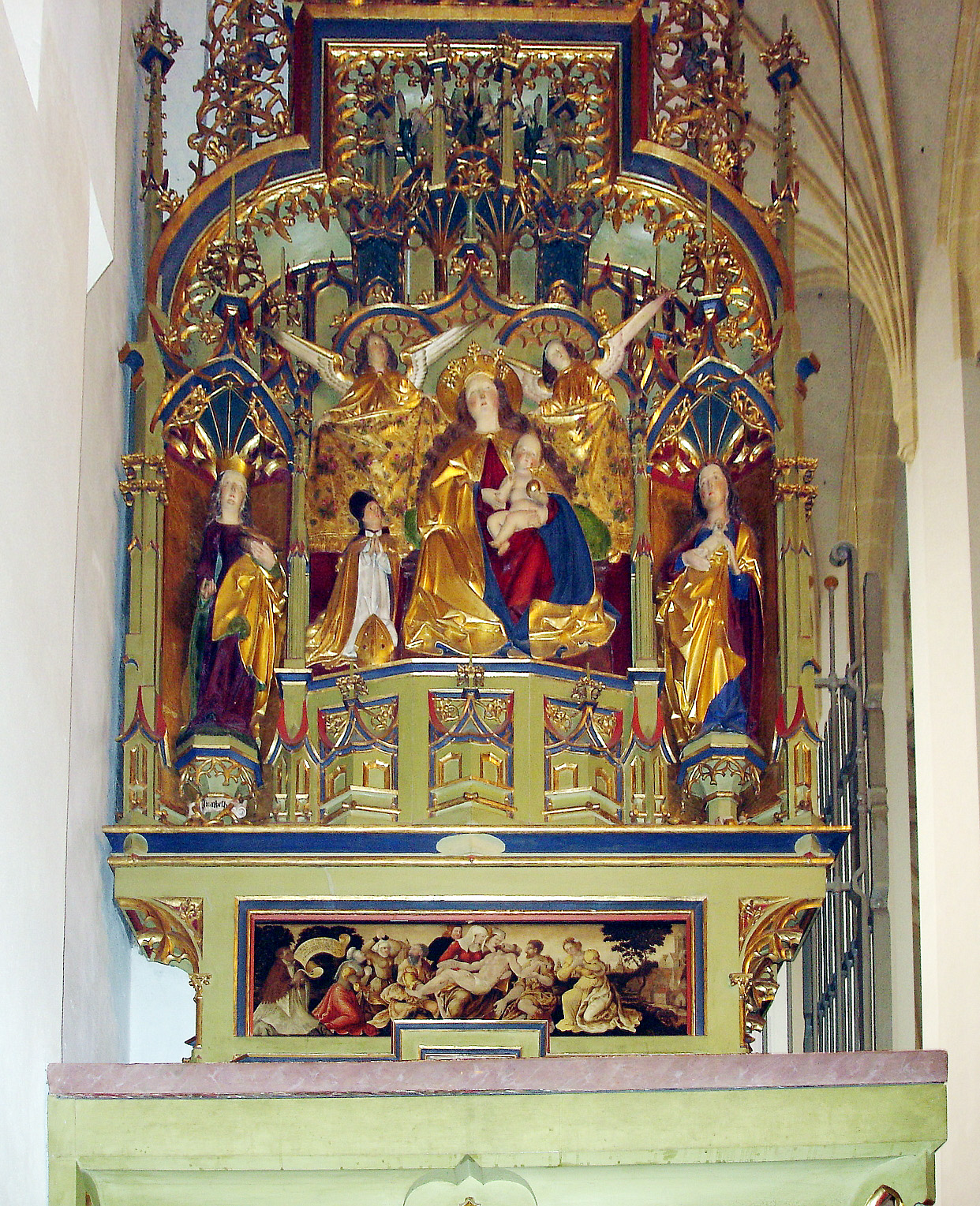 Tulbeckaltar in der Frauenkirche